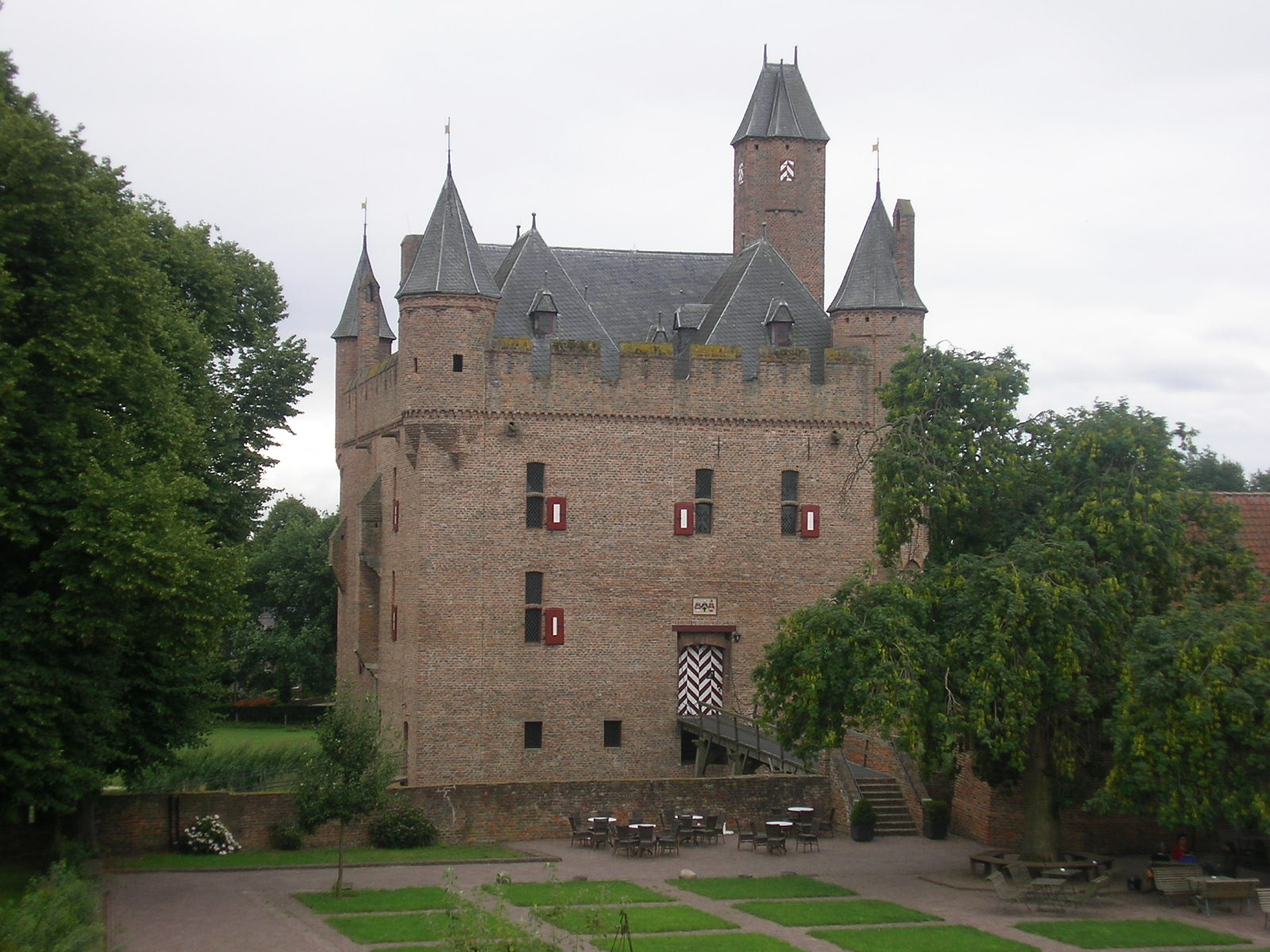 foto gemaakt door wikipedia vrijwilliger gijsevers, kasteel Doornenburg, gemaakt op 08-08-06